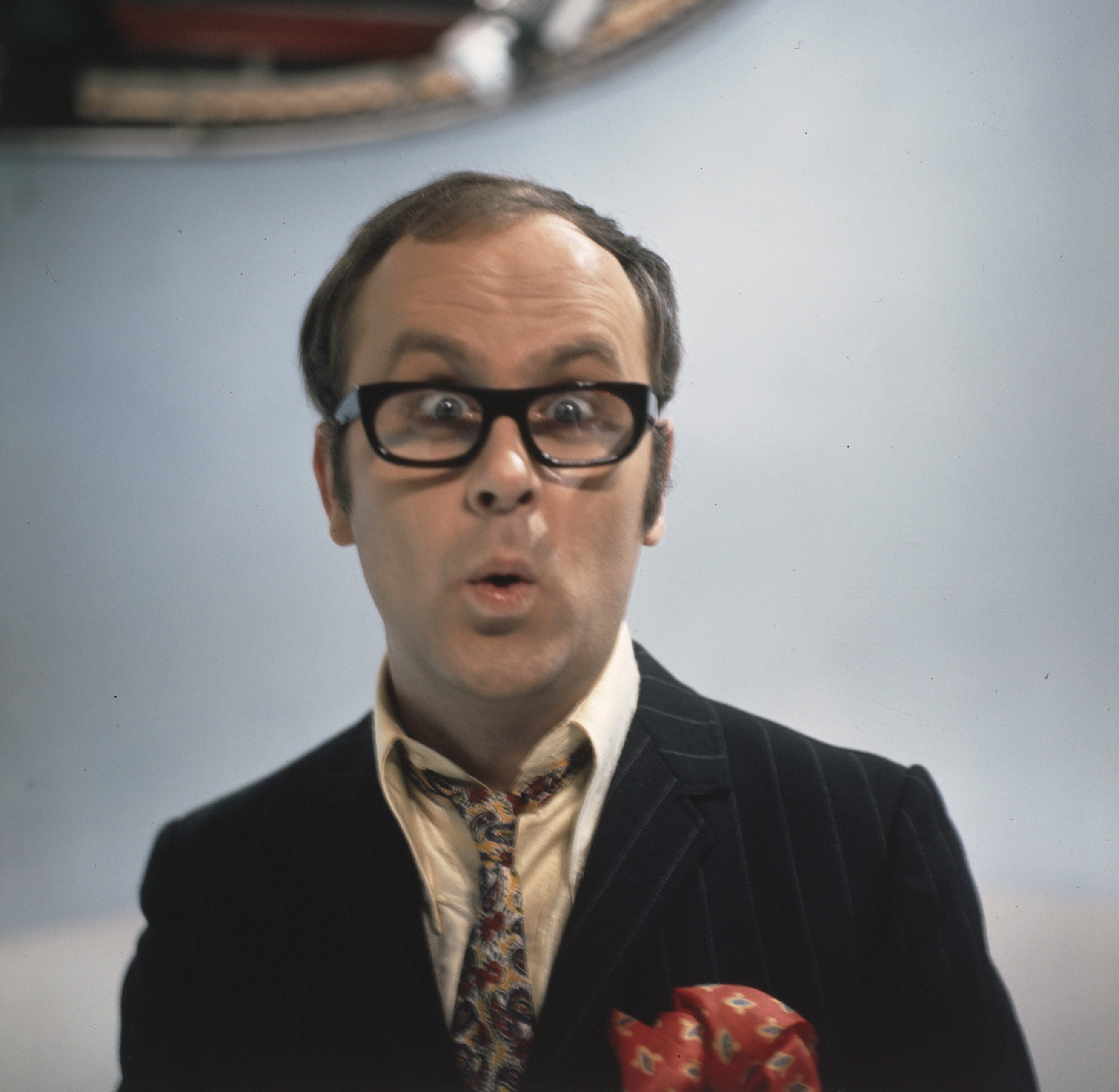 Collectie / Archief : Fotocollectie Anefo Reportage / Serie : [ onbekend ] Beschrijving : TV programma Moef Ga Ga ; presentator Joost den Draaier (Willem van Kooten) Datum : 23 januari 1968 Trefwoorden : portretten, presentatoren, televisie Persoonsnaam : Draaier, Joost den, Kooten, Willem van Fotograaf : Nijs, Jac. de / Anefo Auteursrechthebbende : Nationaal Archief Materiaalsoort : Dia (kleur) Nummer archiefinventaris : bekijk toegang 2.24.01.07 Bestanddeelnummer : 254-7978